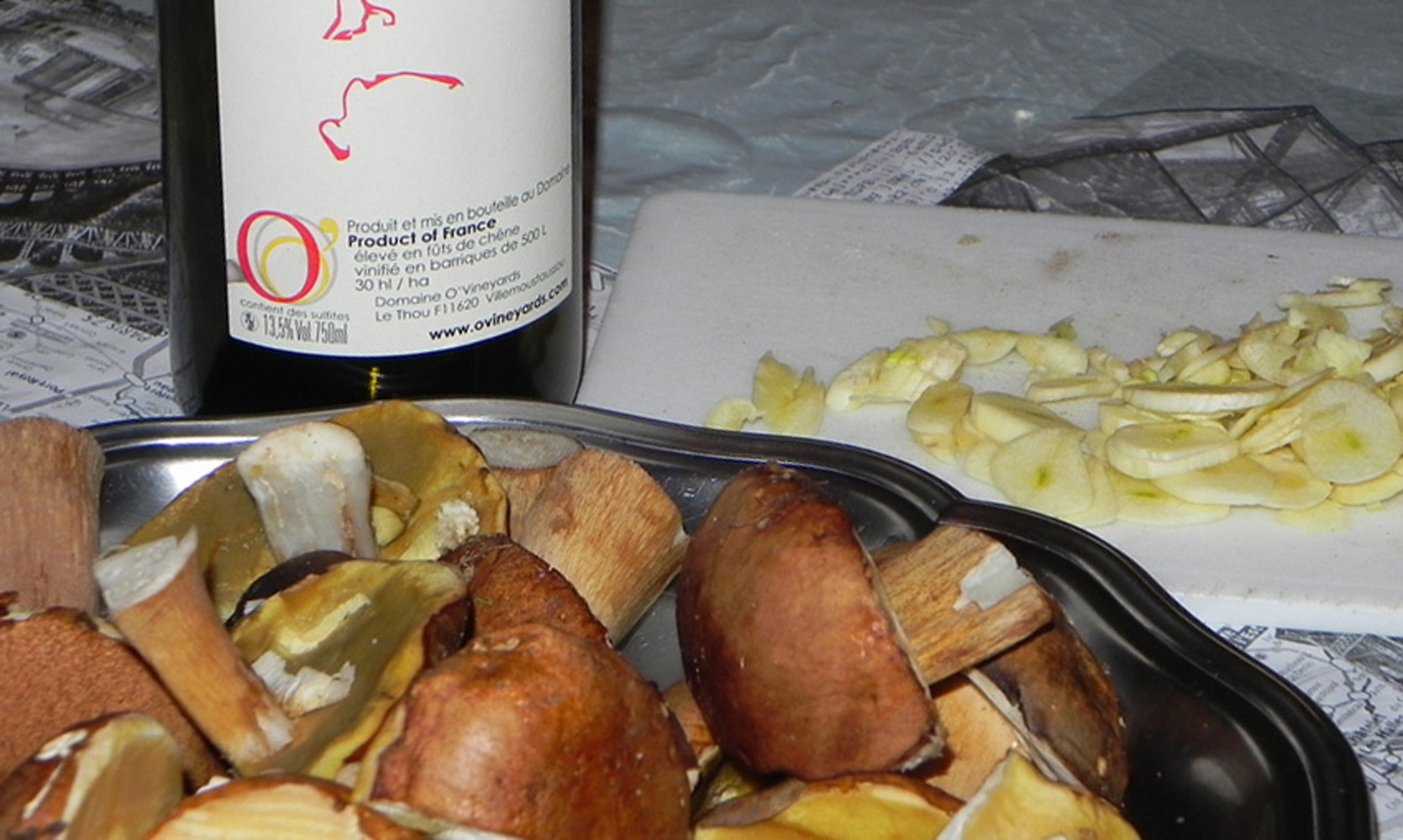 Vin du domaine O'vineyards et cèpes de la Montagne Noire